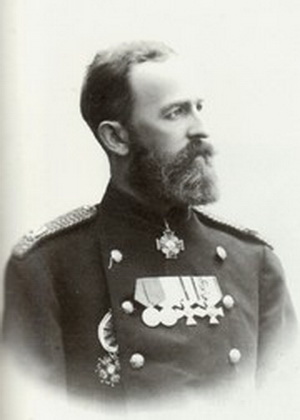 Князь Дмитрий Александрович Львов (1833-1874), шталмейстер Двора Его Величества, умер в умопомешательстве.